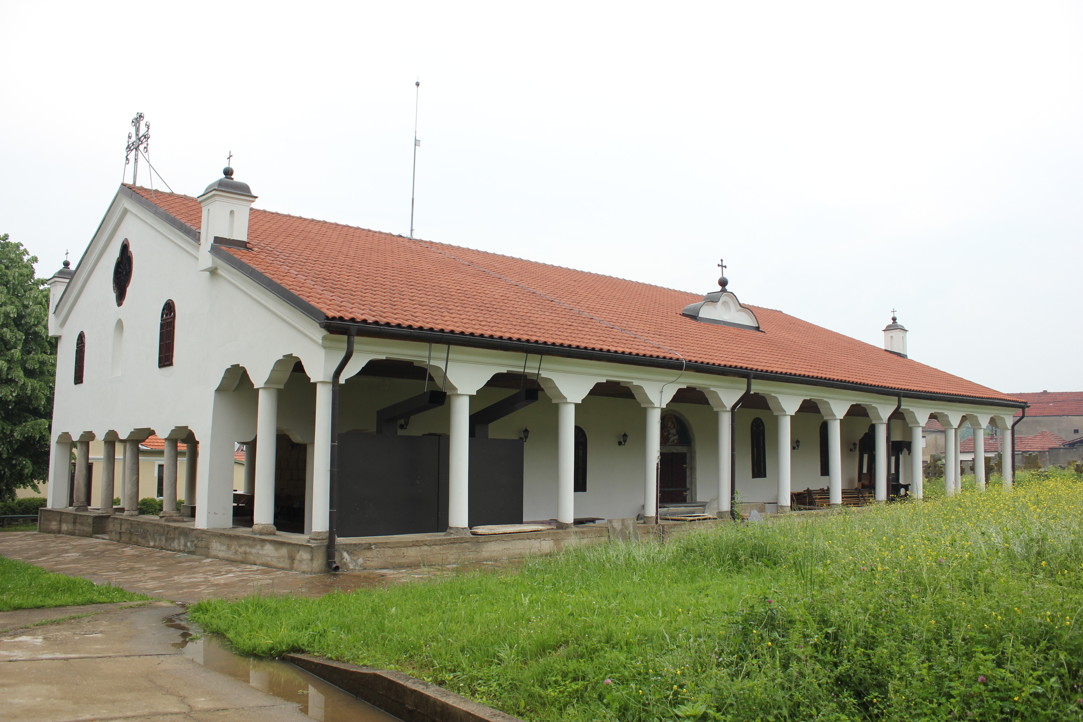 Църква „Слизането на Св. Дух над апостолите" (Св. Петдесетница) в град Власотинце, Сърбия.